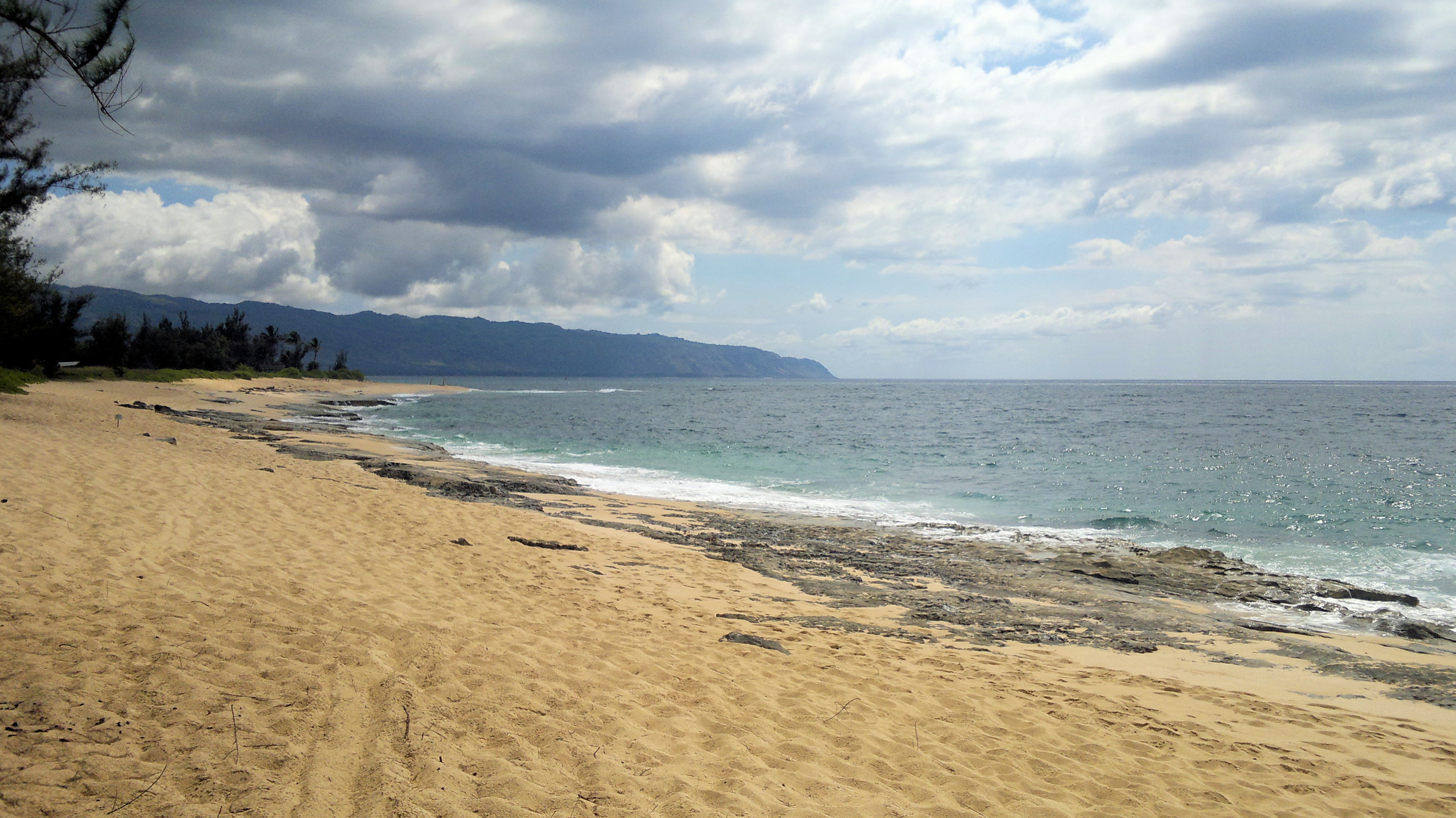 Papailoa Strand im Norden von Oahu